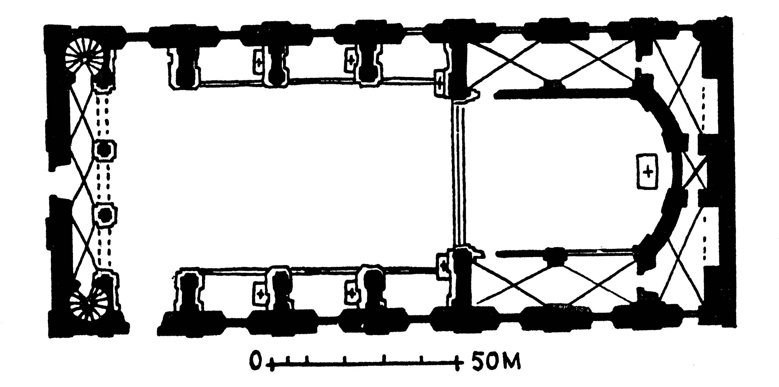 Grundriss der Jesuitenkirche in Dillingen